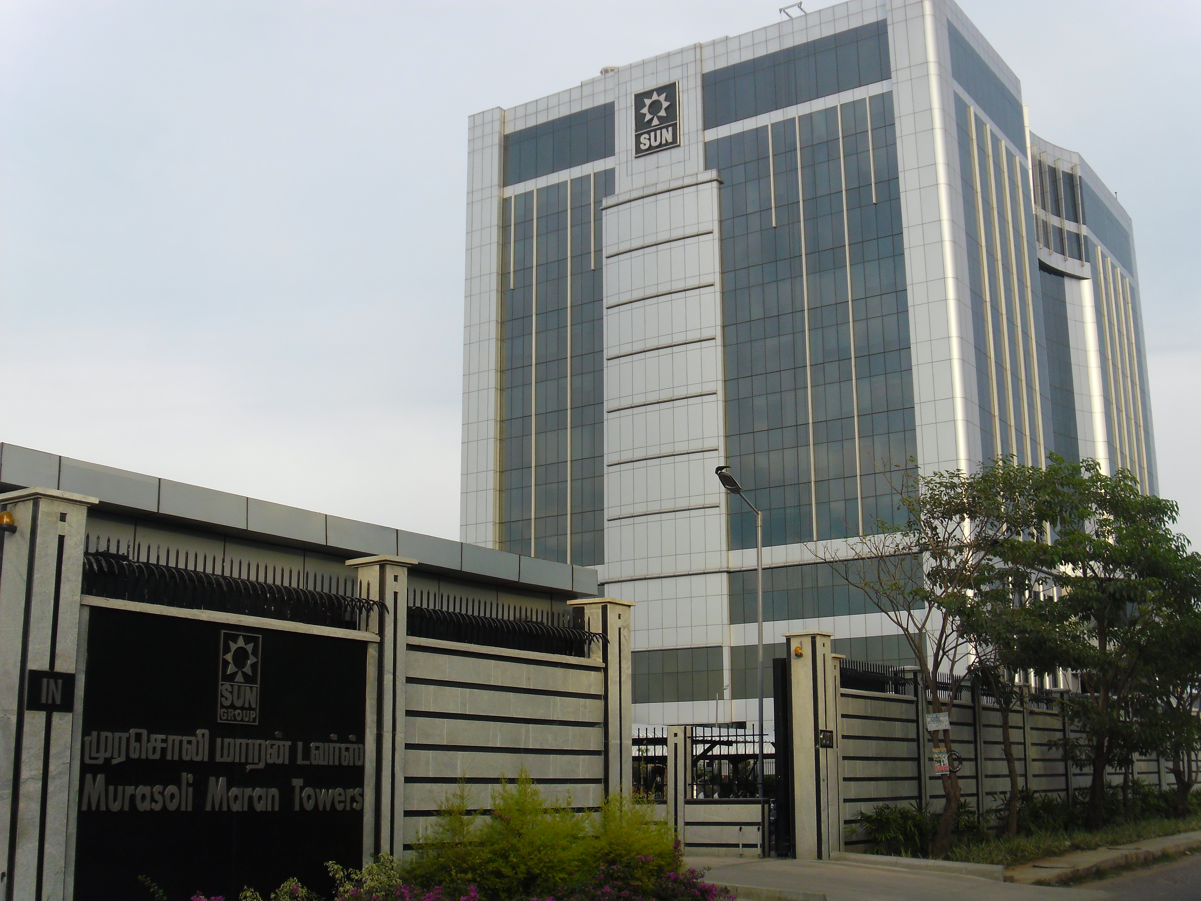 சன் குழுமத்தின் அலுவலகம், எம்.ஆர்.சி. நகர், சென்னை